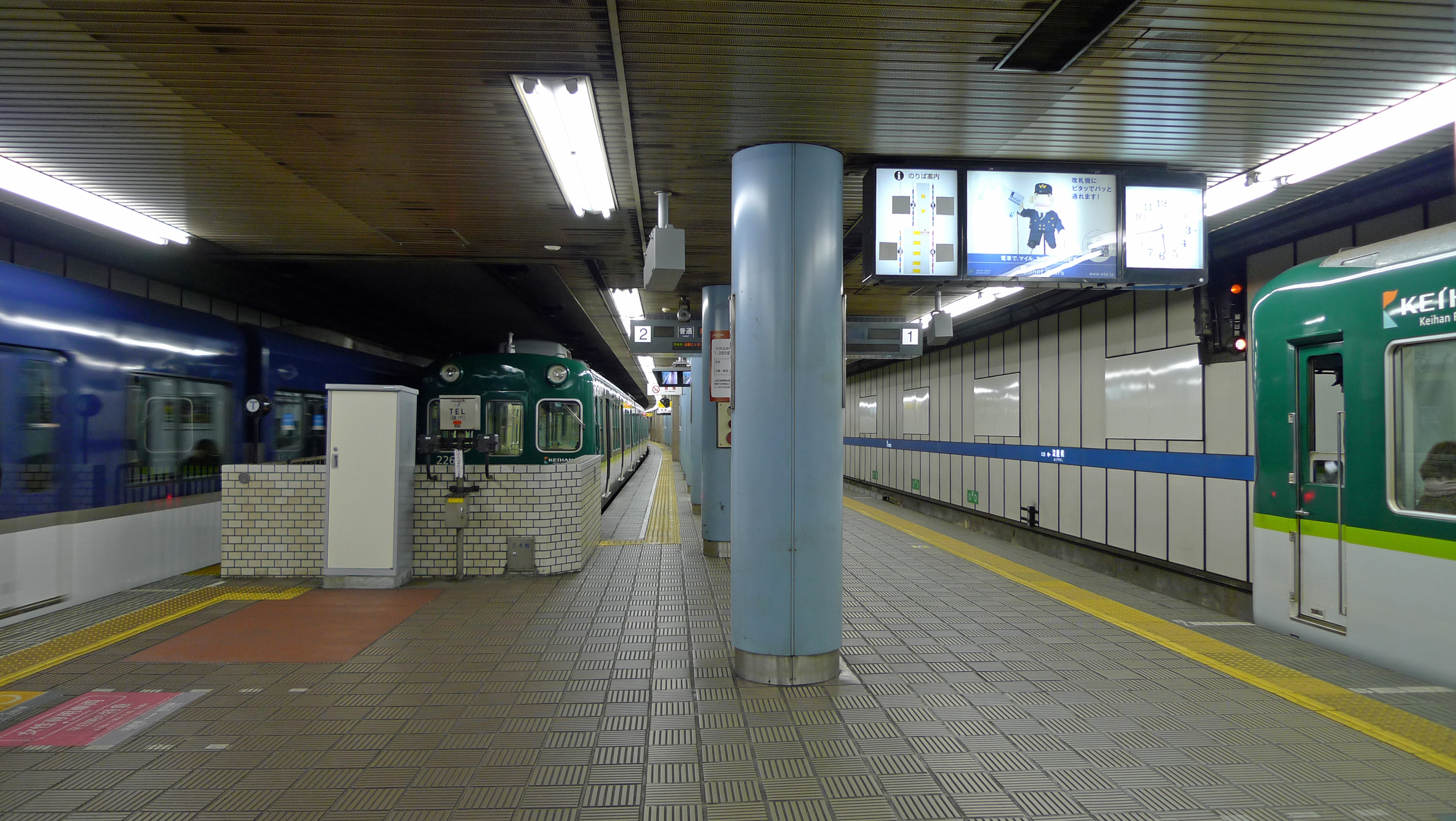 京阪本線淀屋橋駅ホーム（切欠き部）